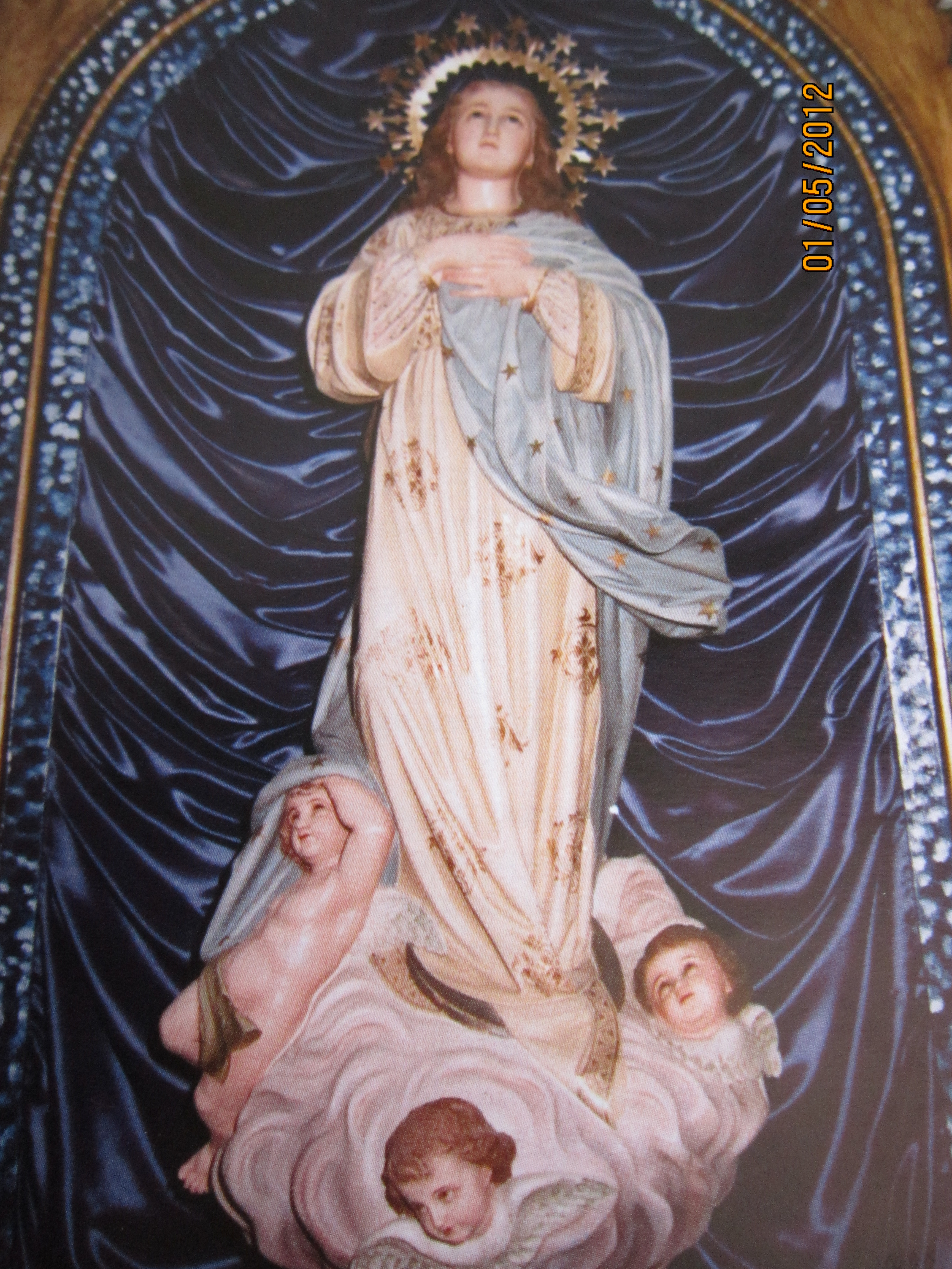 La Excelsa. Patrona María Imacula es la patrona de Casas Nuevas y las fiestas mayores de la pedania se hacen en honor a ella.